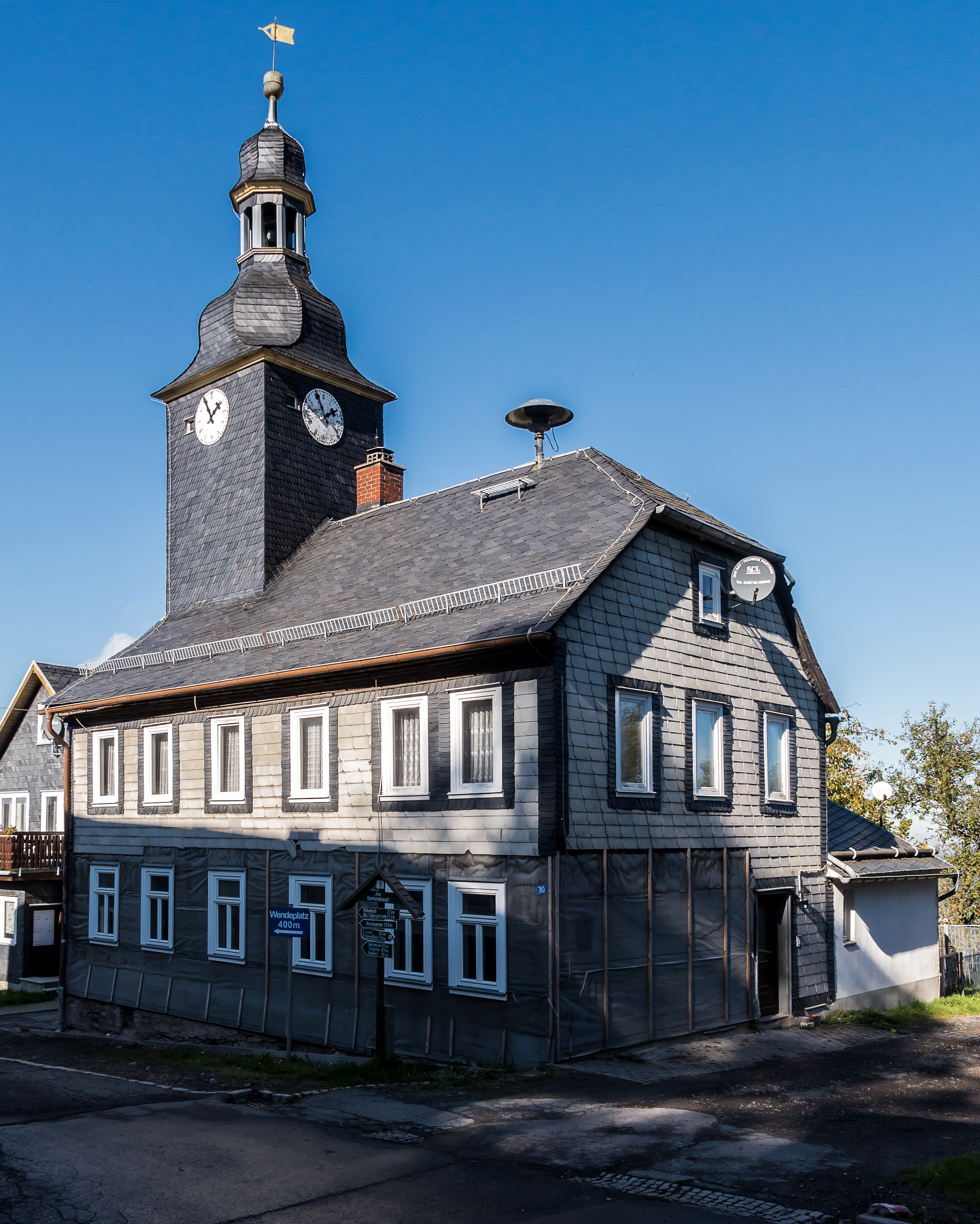 Lichtenhain-Bergbahn Ortsstraße 30 Ehem. Schule (Alte Schule)